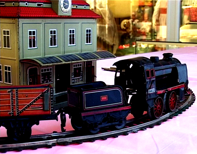 Blechmodell einer Dampflok um 1949 mit Uhrwerkantrieb aus dem Spielzeugmuseum Bad Lauterberg am Harz. Hersteller unbekannt. Original Szenenfoto aus dem Imagefilm der ProMediaTeam Ltd. - Deutschland